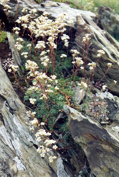 Saxifraga paniculata